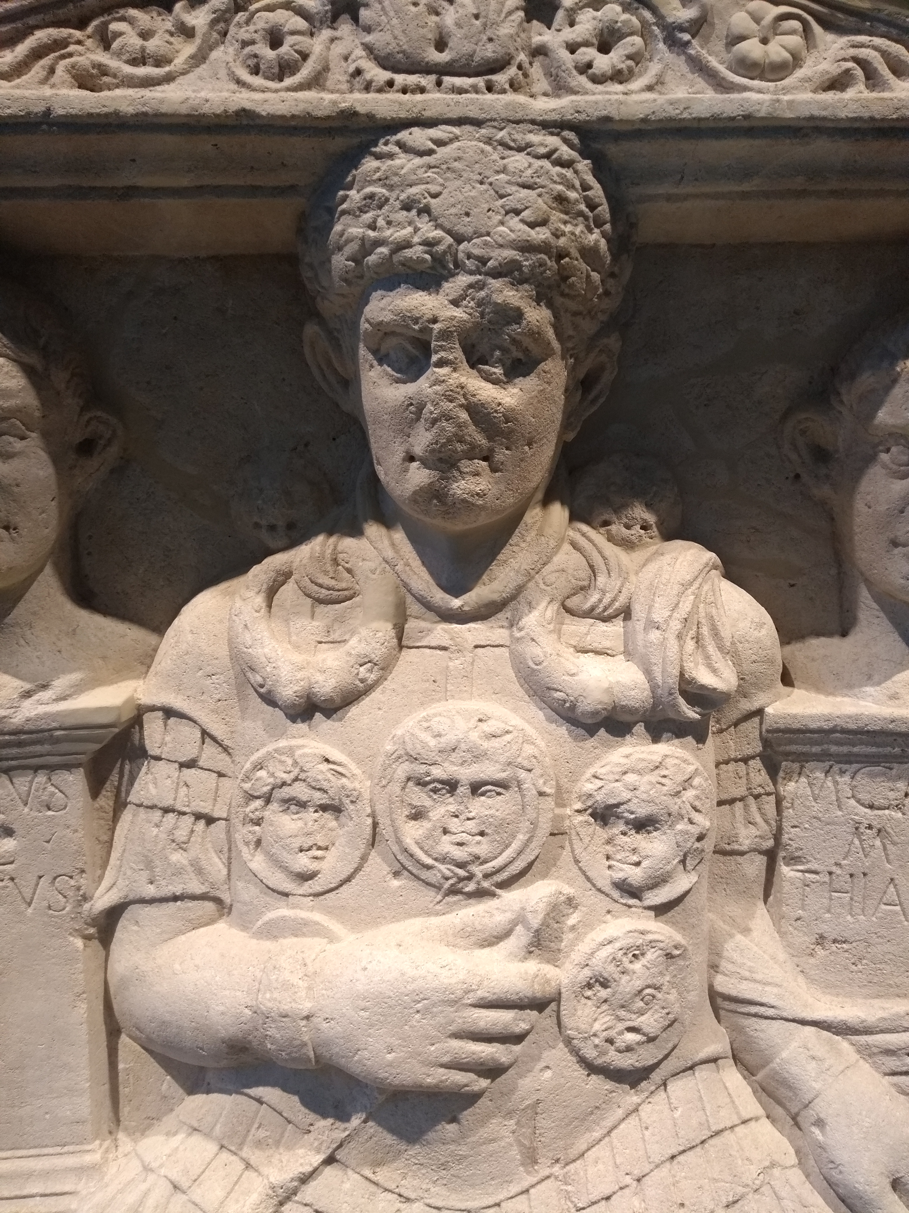 Grabstein des Marcus Caelius, Rheinisches Landesmuseum Bonn, Detail